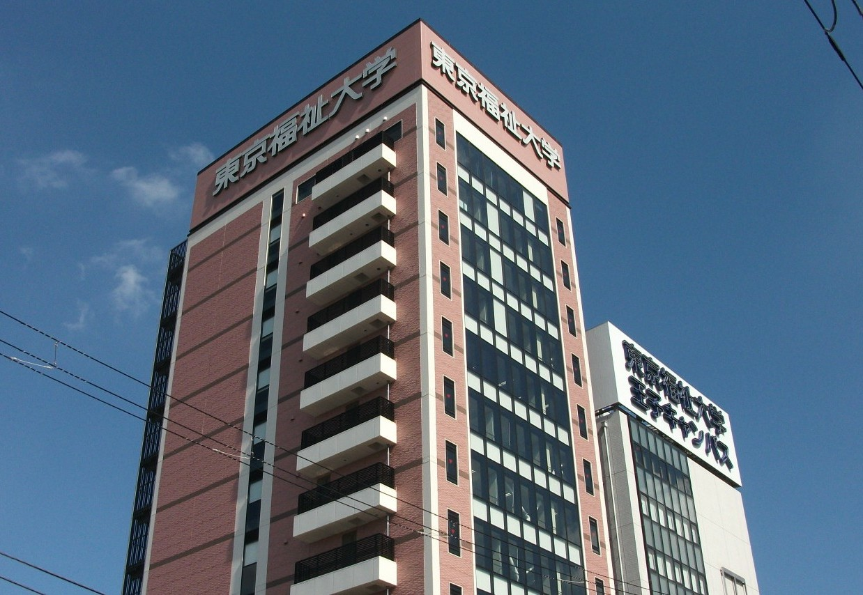 東京福祉大学 王子キャンパス校舎